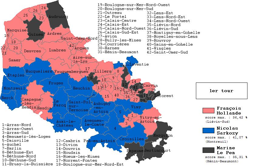 Carte indiquant le candidat arrivé en tête au 1er tour de l'élection présidentielle française de 2012, dans les 77 cantons du Pas-de-Calais. Source : Résultats par canton élection présidentielles 2012 - Tour 1 sur